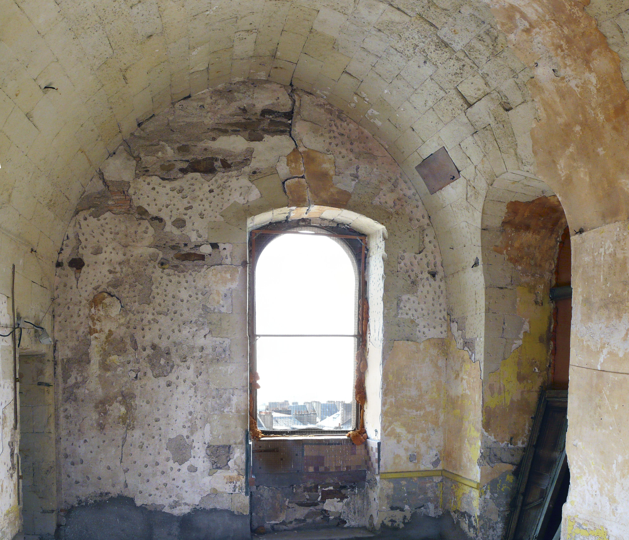 Voûtes du "Cabinet des montres" au quatrième étage. Ces voûtes présentes au troisième et quatrième étage de la tour sont destinées à atténuer toutes vibrations pouvant perturber le réglage des instruments du cabinet (pour celles du troisième étage) et les observations astronomiques de la terrasse (pour celles du cabinet) .